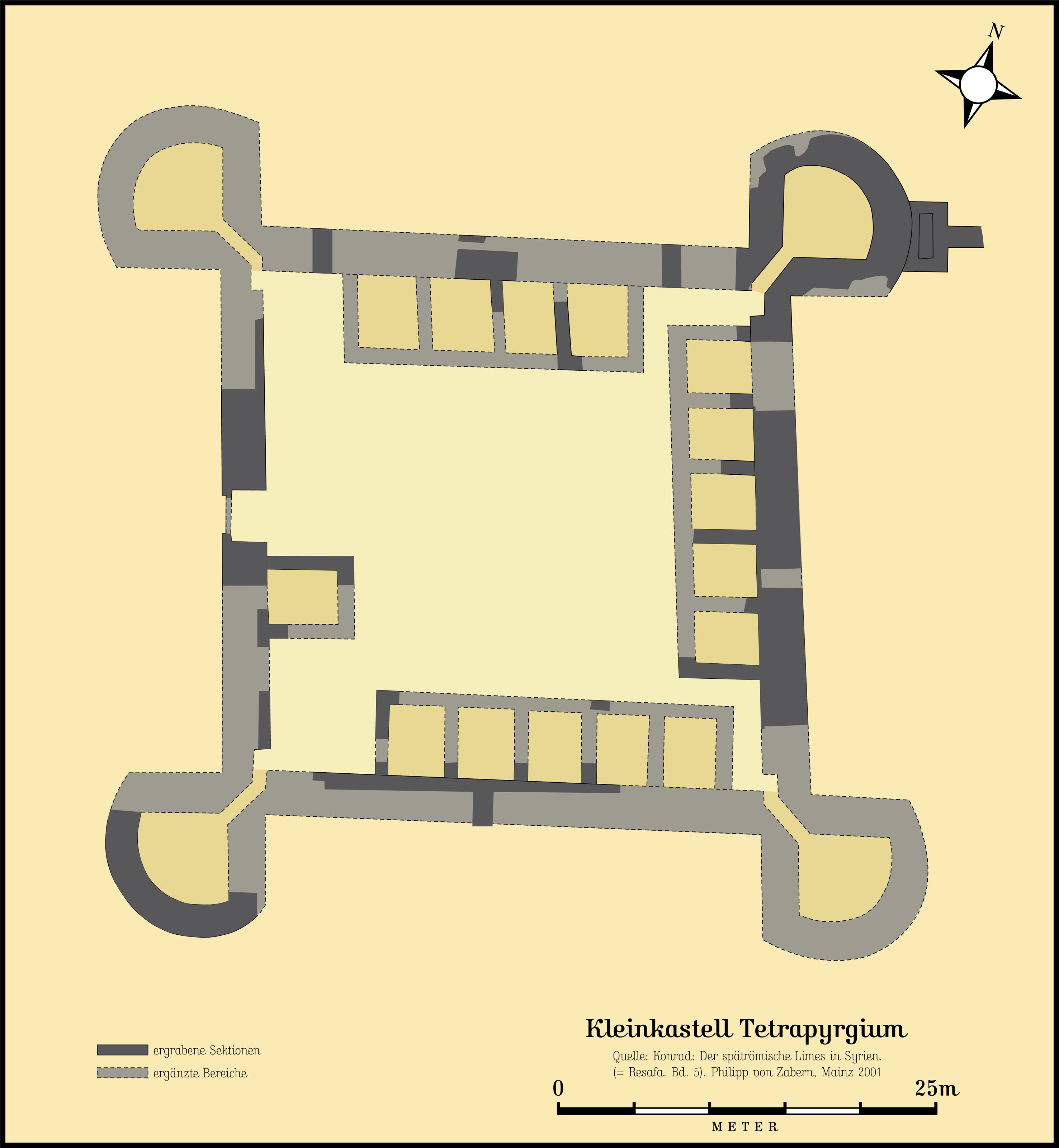 Das Kleinkastell Tetrapyrgium am spätantiken nordsyrischen Limes. Die Quelle zu dieser Zeichnung befindet sich in der Bilddatei!